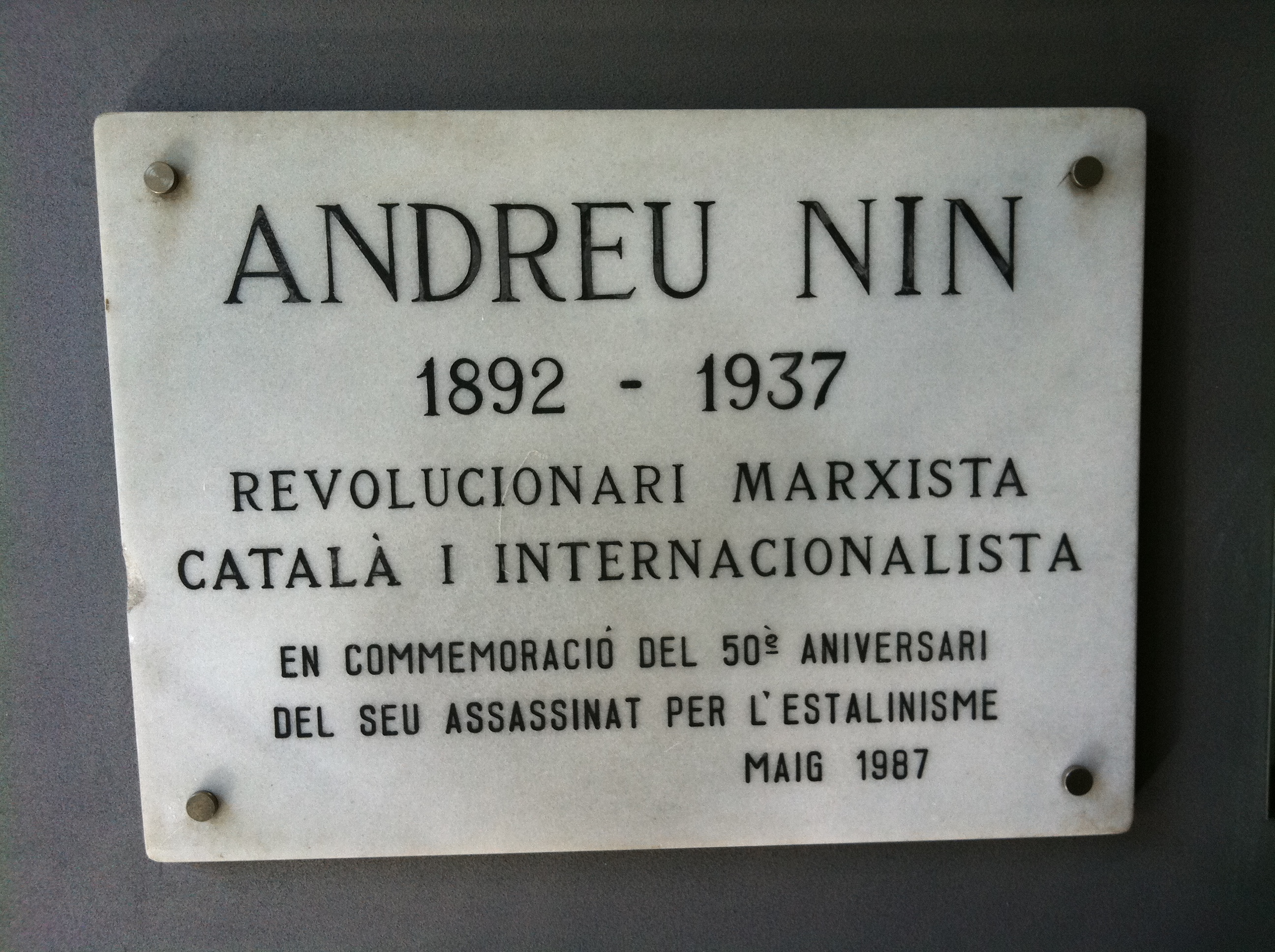 Placa Andreu Nin a Biblioteca Pública de les Rambles de Barcelona